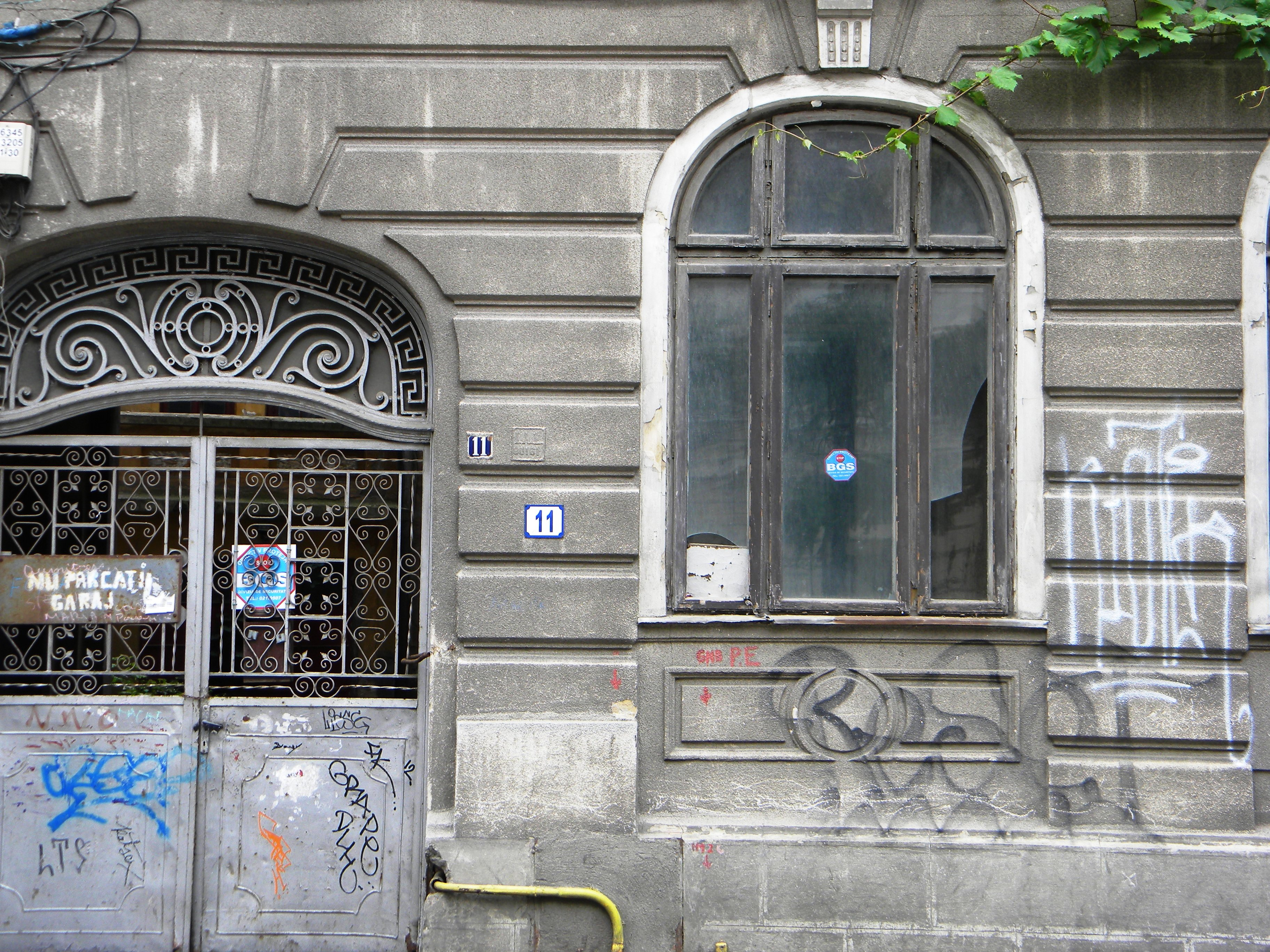 Bucuresti, Romania, Casa pe Calea Grivitei nr. 11, sect. 1 (detaliu)